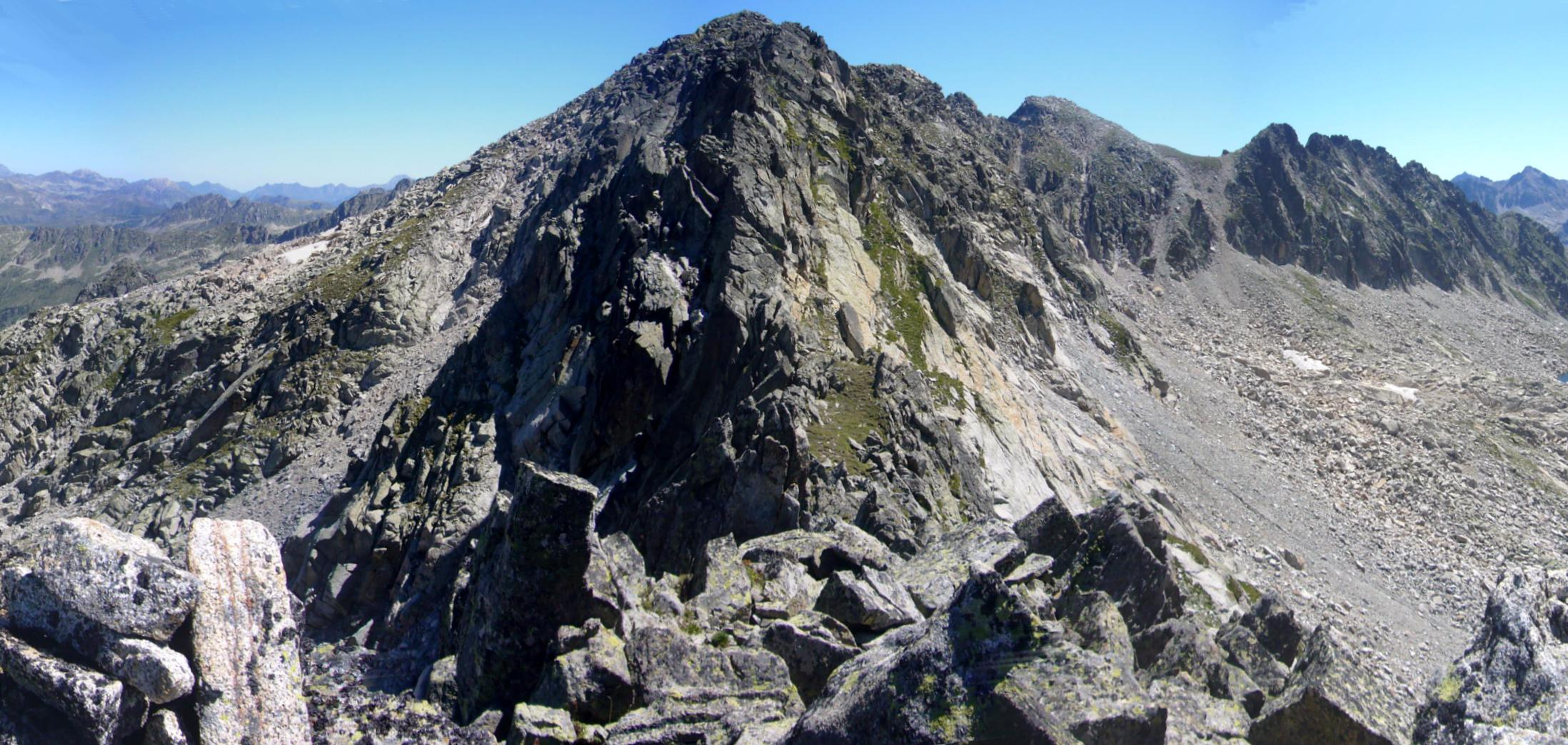 Tuc Blanc vist des de l'oest; la Vall de Boí, Alta Ribagorça, Catalunya